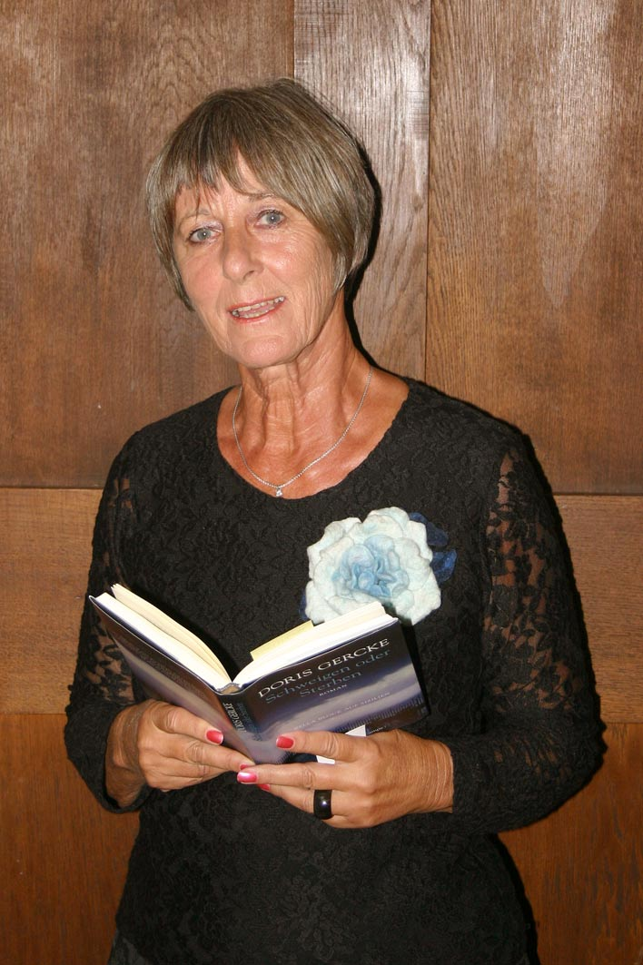 Doris Gercke (* 7. Februar 1937 in Greifswald) ist eine deutsche Krimi-Schriftstellerin. Sie arbeitet auch unter dem Pseudonym Marie-Jo Morell.